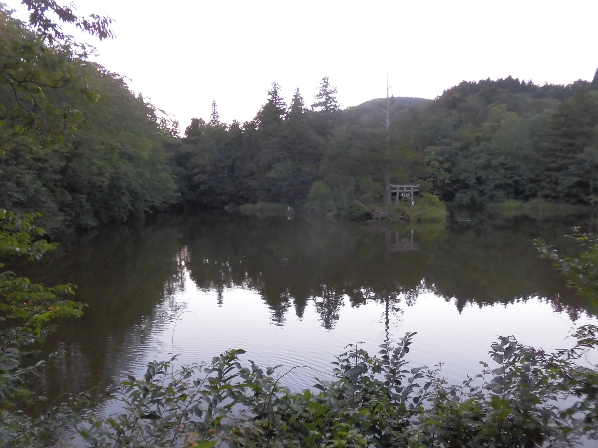 大沼の浮島。山形県西村山郡朝日町に所在。 大正14年に国の名勝に指定。